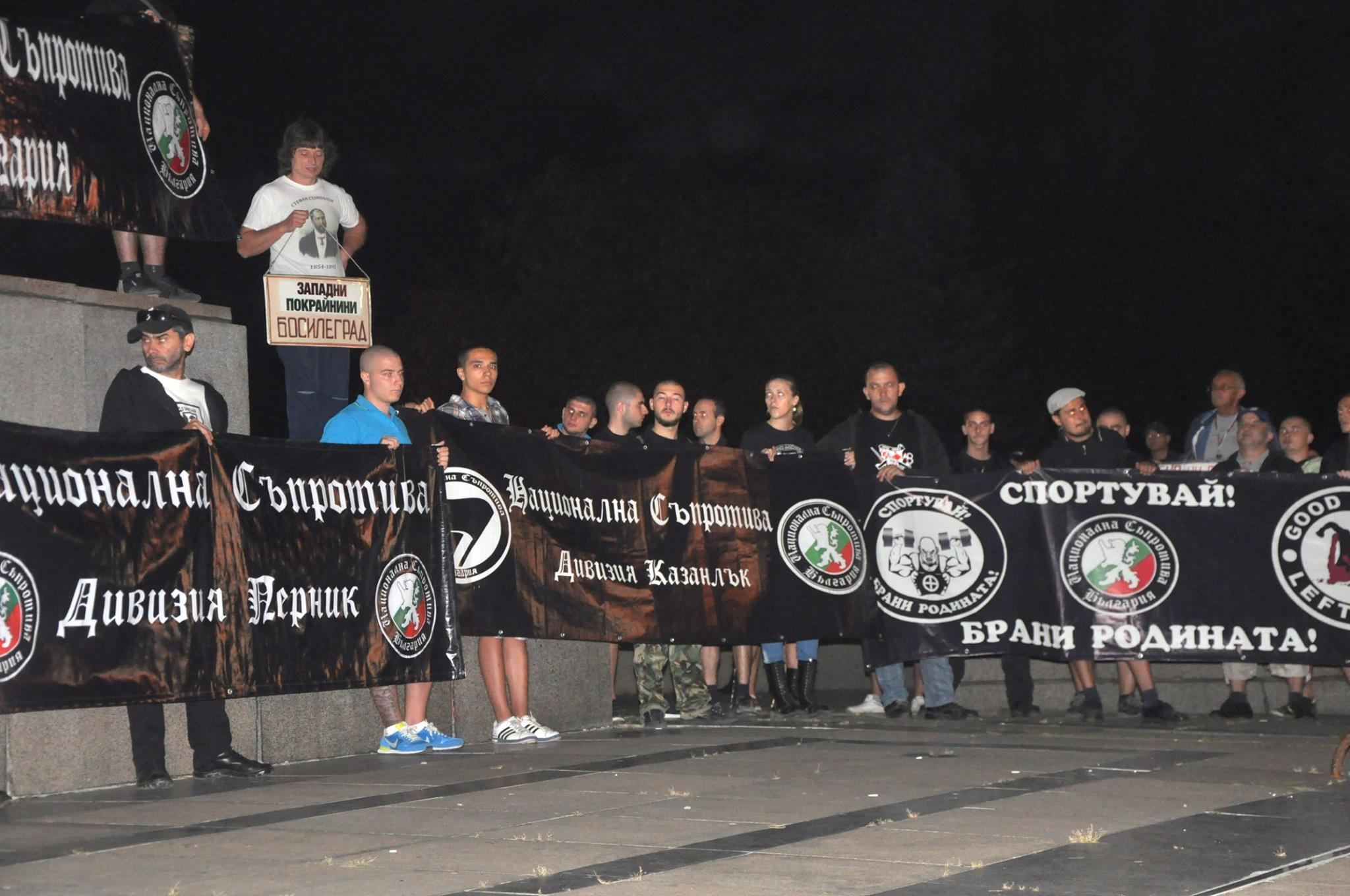 Национална съпротива срещу комунизма